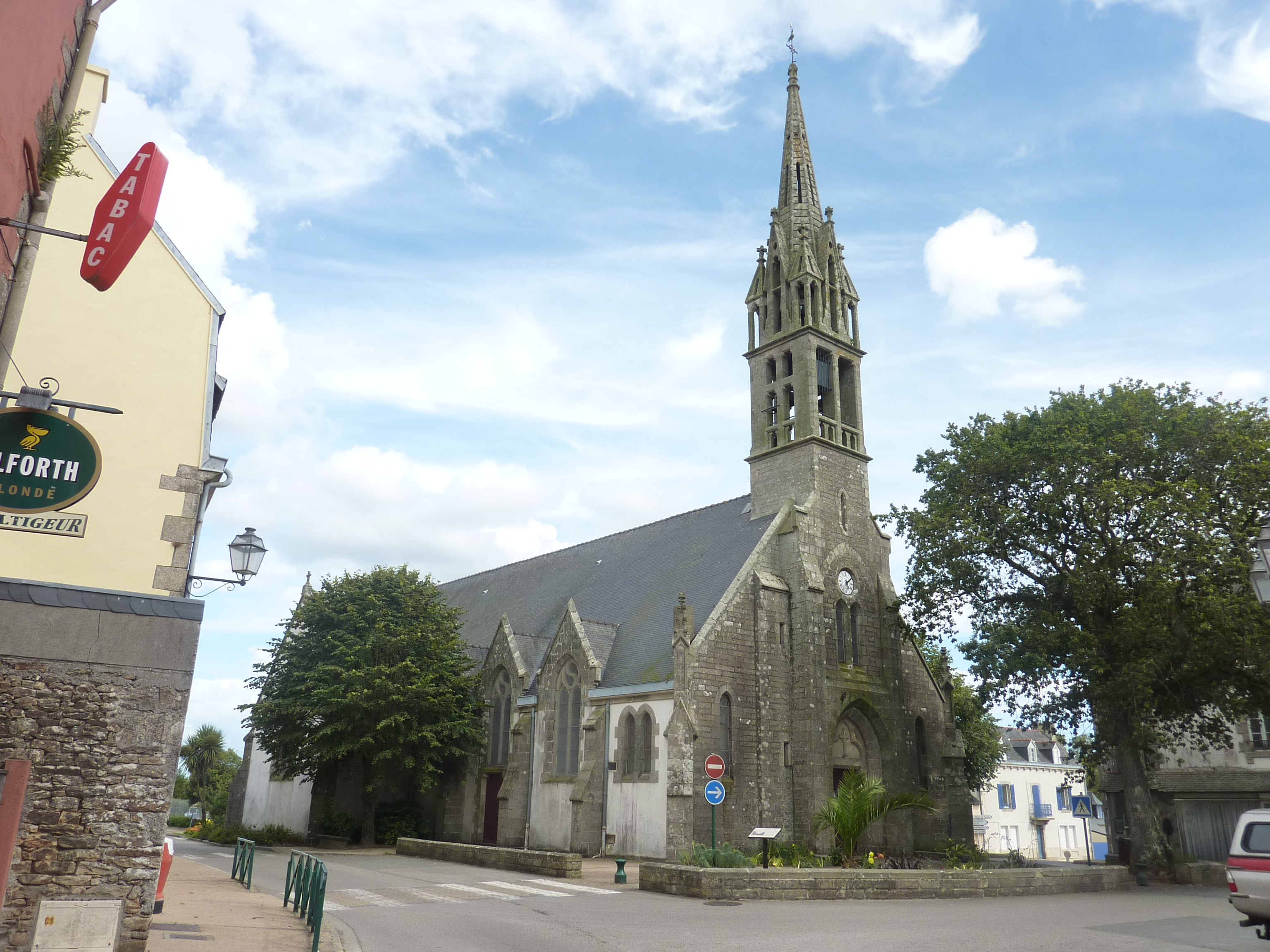 Beuzec-Conq : l'église paroissiale Saint-Budoc